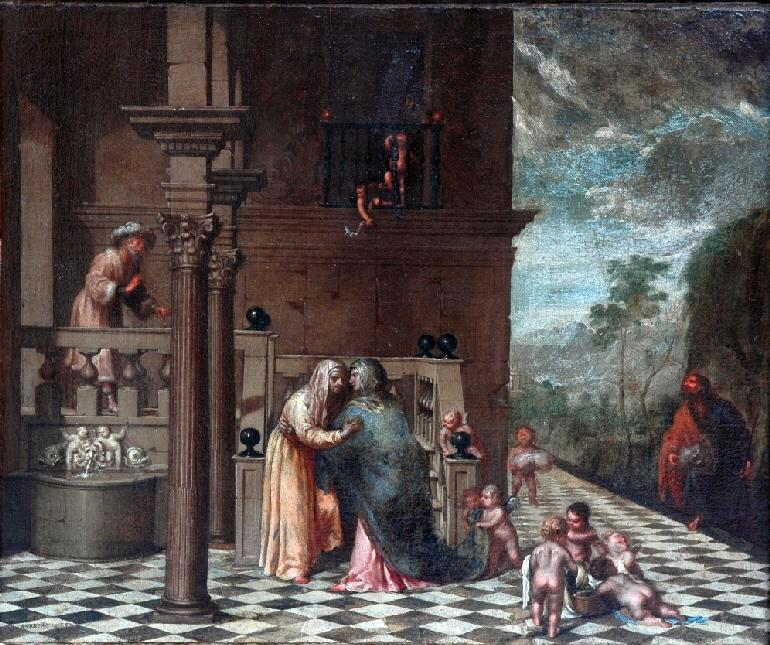 La obra representa a la Virgen María, que estaba embarazada del Niño Jesús, visitando a su prima Santa Isabel, que estaba embarazada del futuro profeta San Juan Bautista.